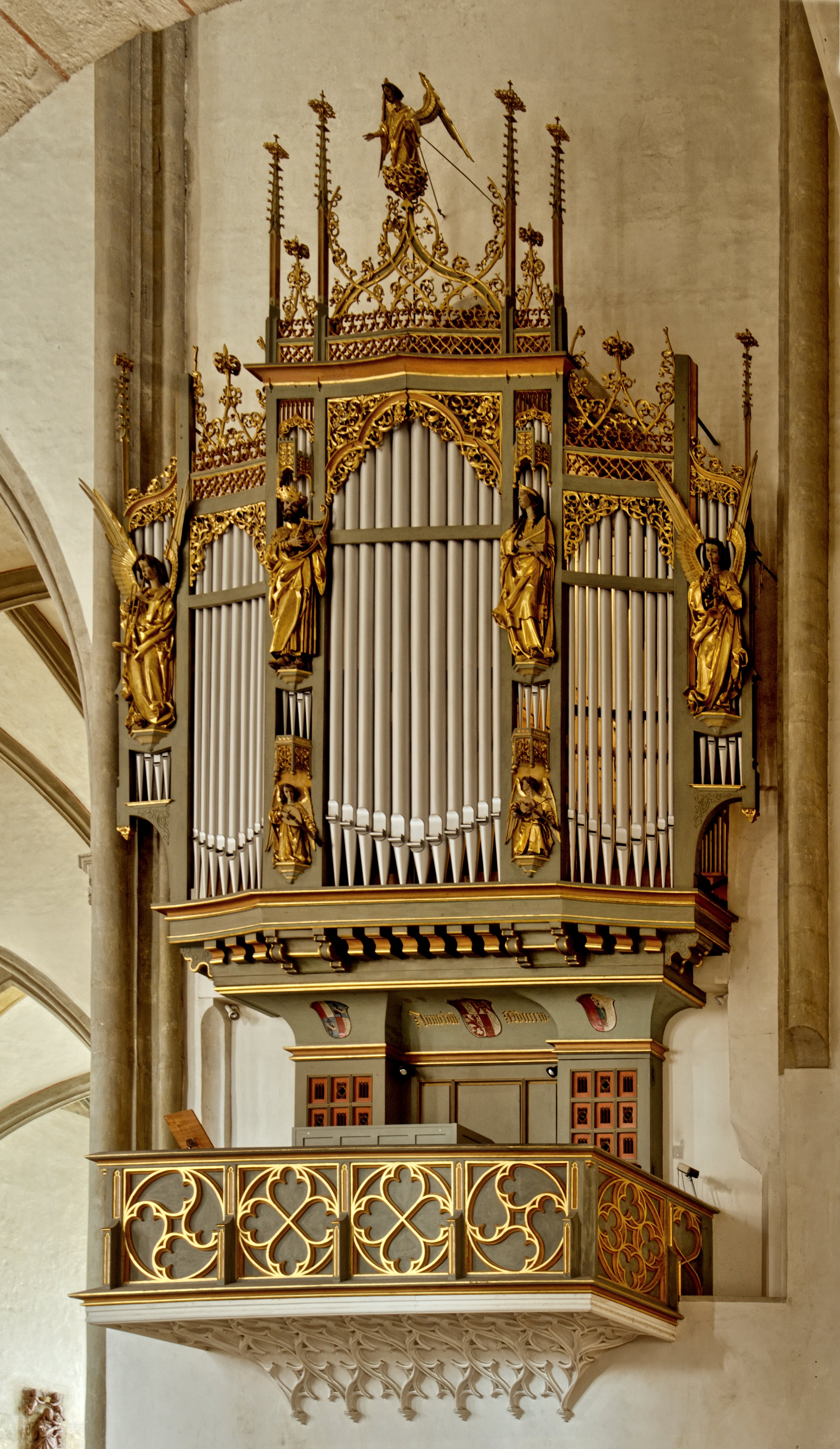 Bilder aus dem Augsburger Dom